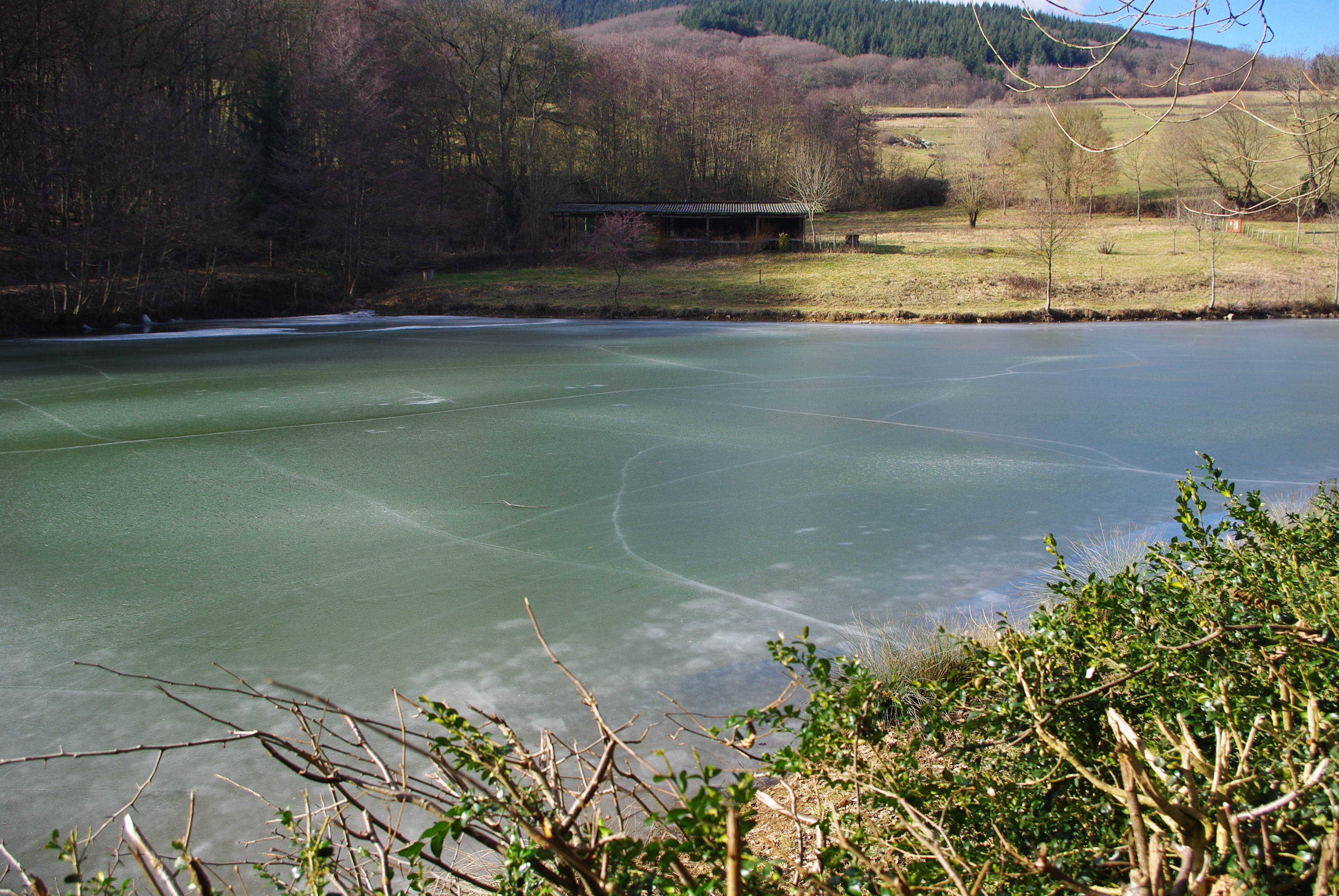 Étang d'azé pris sous la glace (Saône-et-Loire, France)